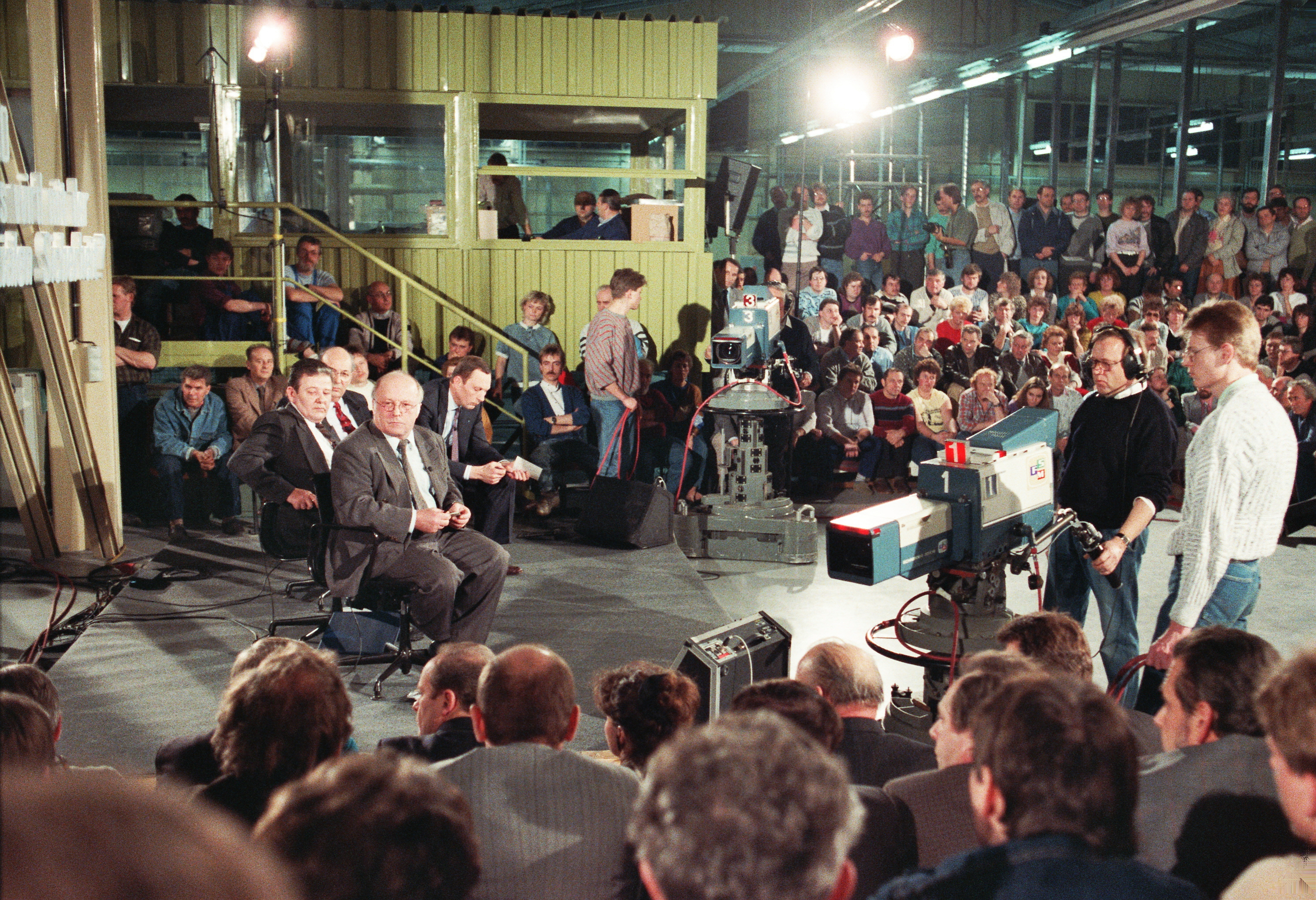 Norbert Blüm, Bundesminister für Arbeit und Sozialordnung, im Februar 1990 auf einem Forum in Teltow. Die Veranstaltung trug den Namen „Richtung Deutschland“ und wurde als Live-Sendung im ZDF ausgestrahlt. Es ging um hochaktuelle Fragen zur weiteren Entwicklung in der DDR nach der Wende. Ort der Veranstaltung: VEB Elektronische Bauelemente „Carl von Ossietzky“ Teltow, neue „SIEMENS-Widerstands-Halle“, Warthestraße 6.